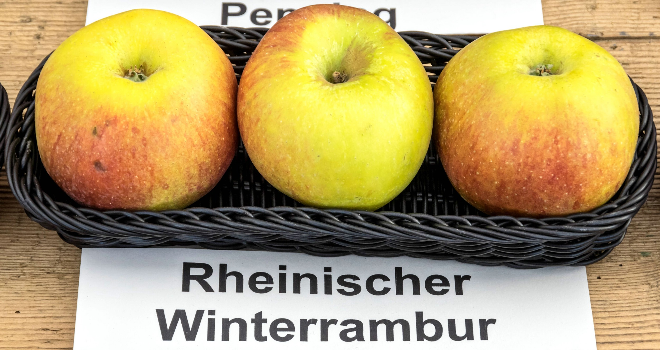 Alte Apfelsorten, von denen es im Badischen noch tragende Bäume gibt. Alle Aufnahmen au dem Oktober 2015